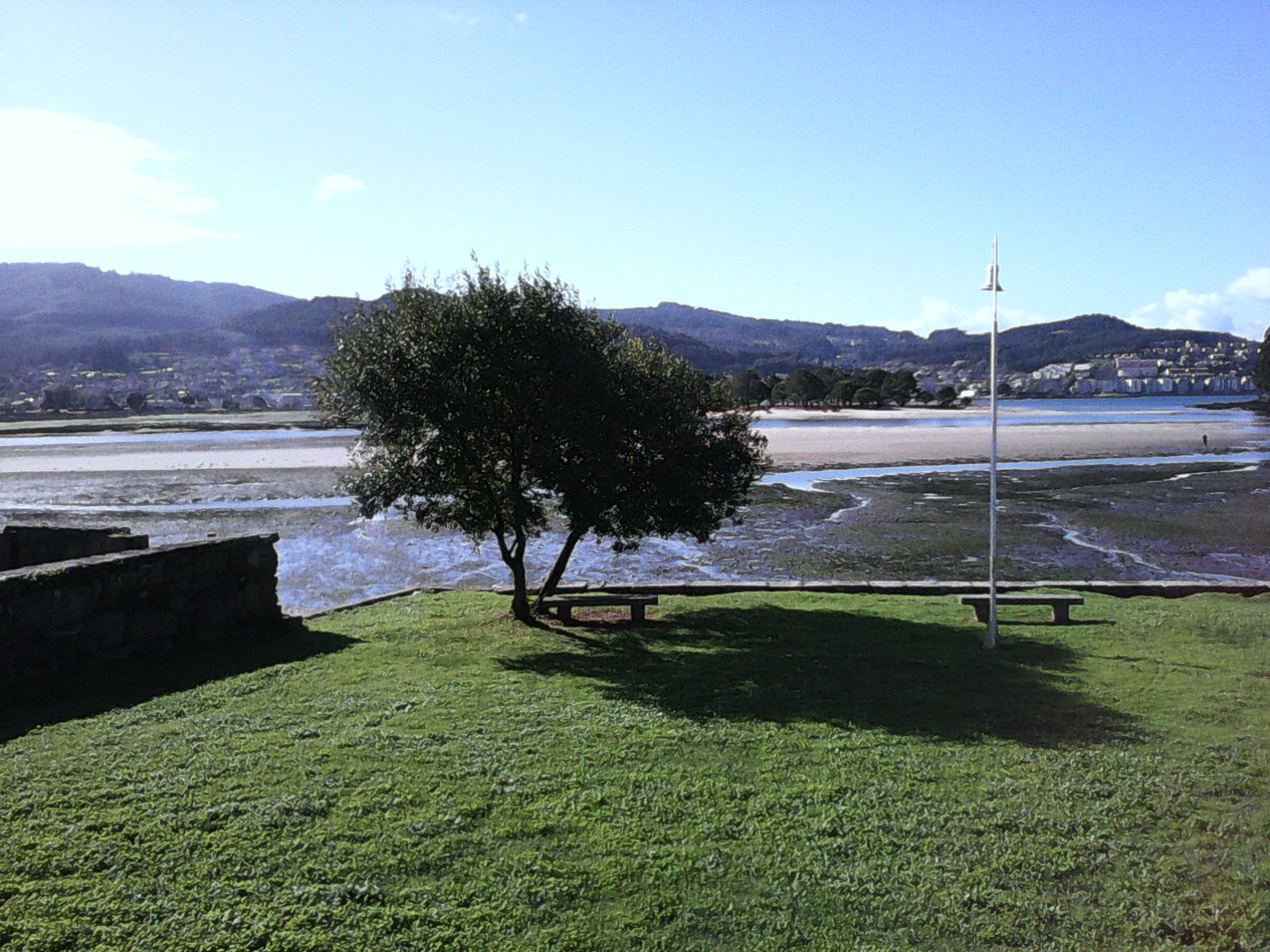 Estuario foz